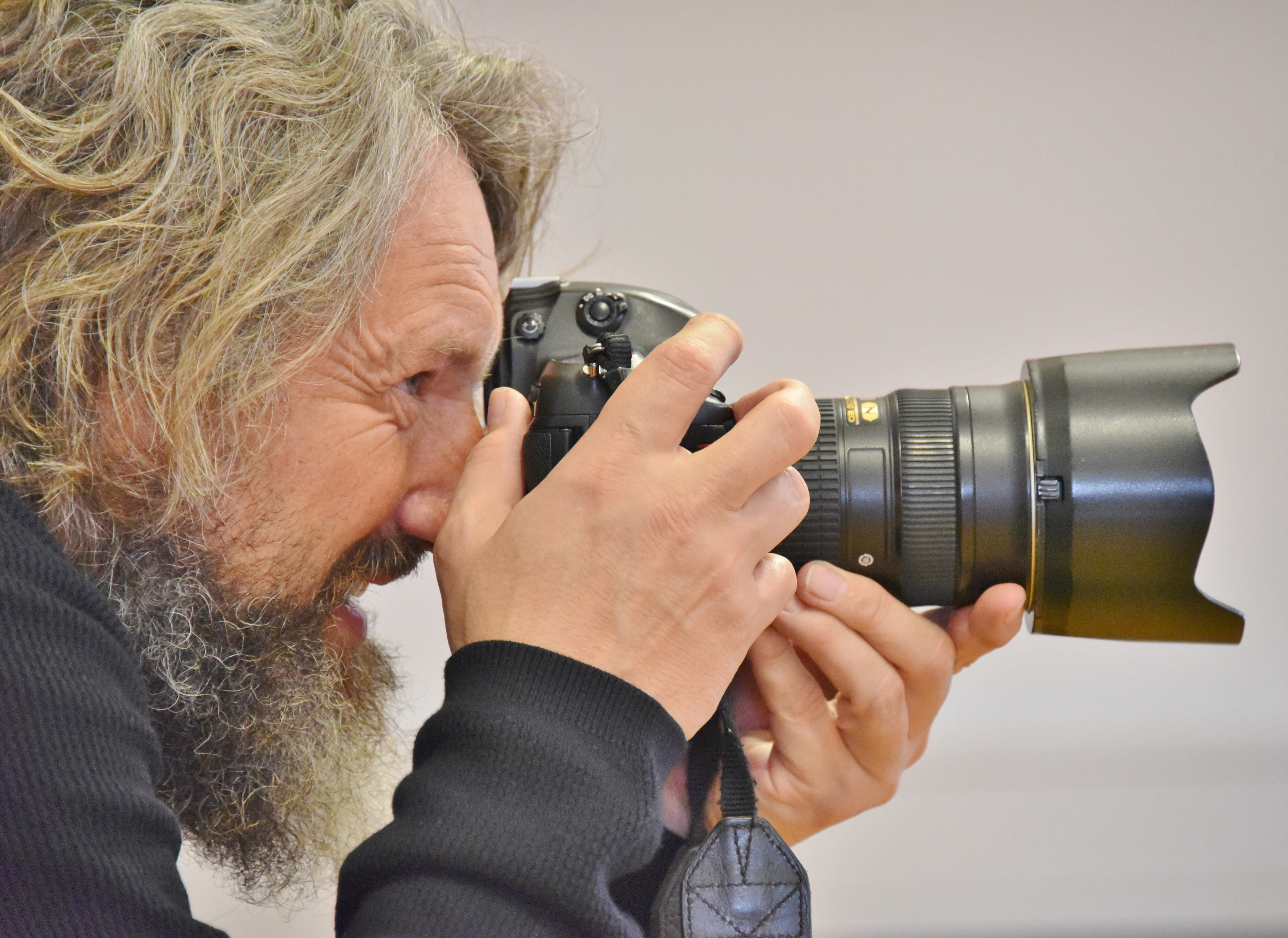 Heribert Corn Oktober 2016